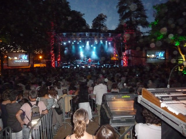 Empot Grand 2010